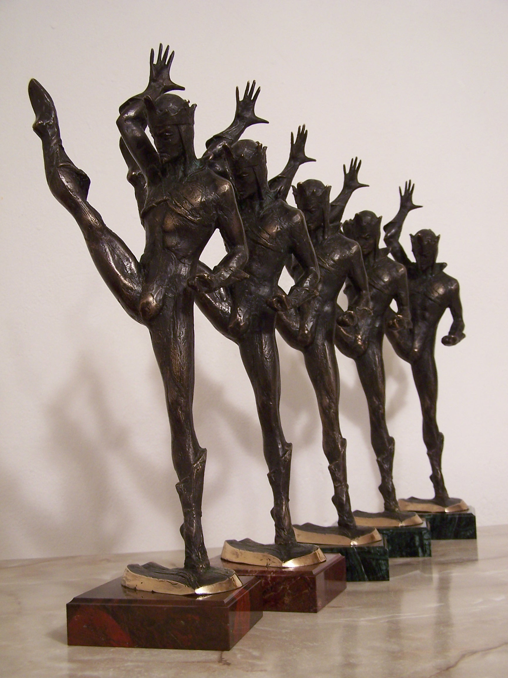 Statuetka "Wojciech"